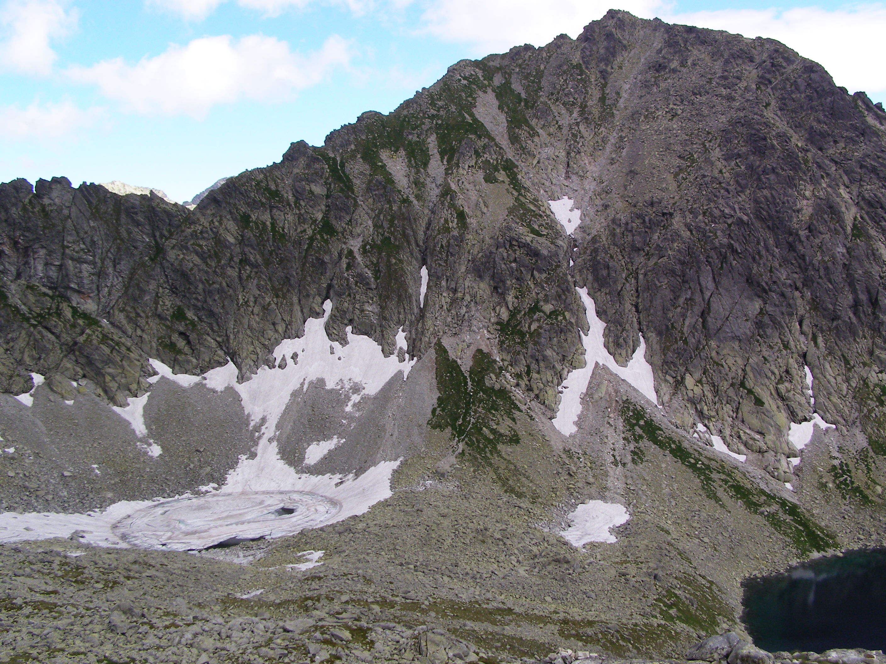 Okruhle pleso, Vysoke Tatry